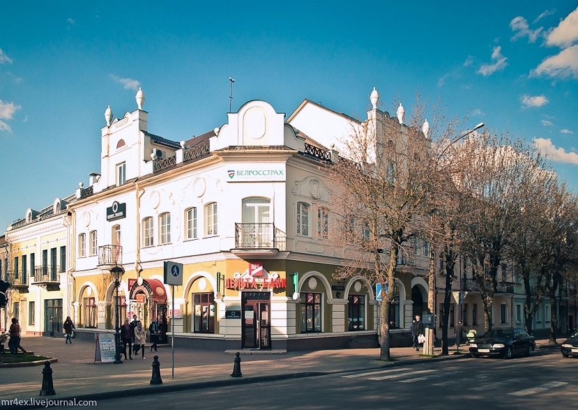 Брэст. Савецкая вуліца